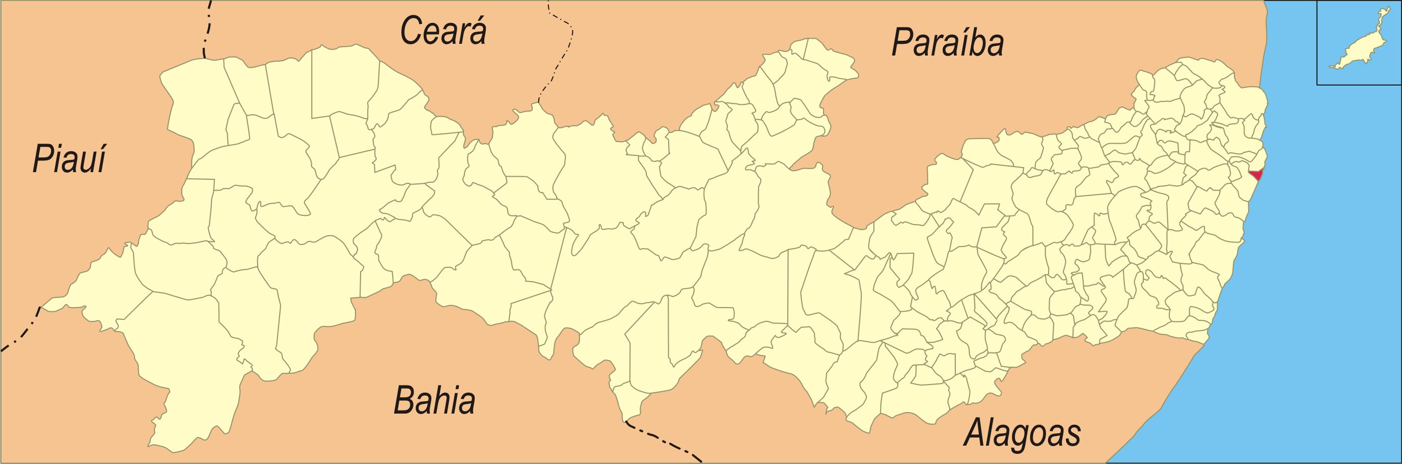 Localização da cidade em Pernambuco